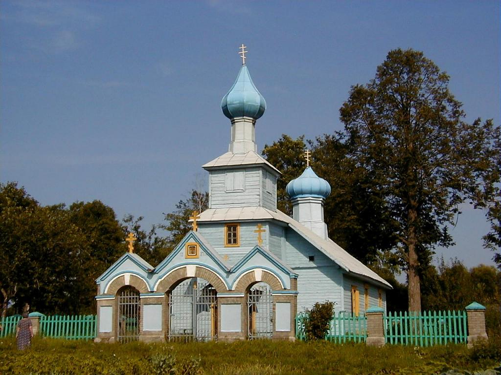 Slostovkas vecticībnieku baznīca 2003-07-27